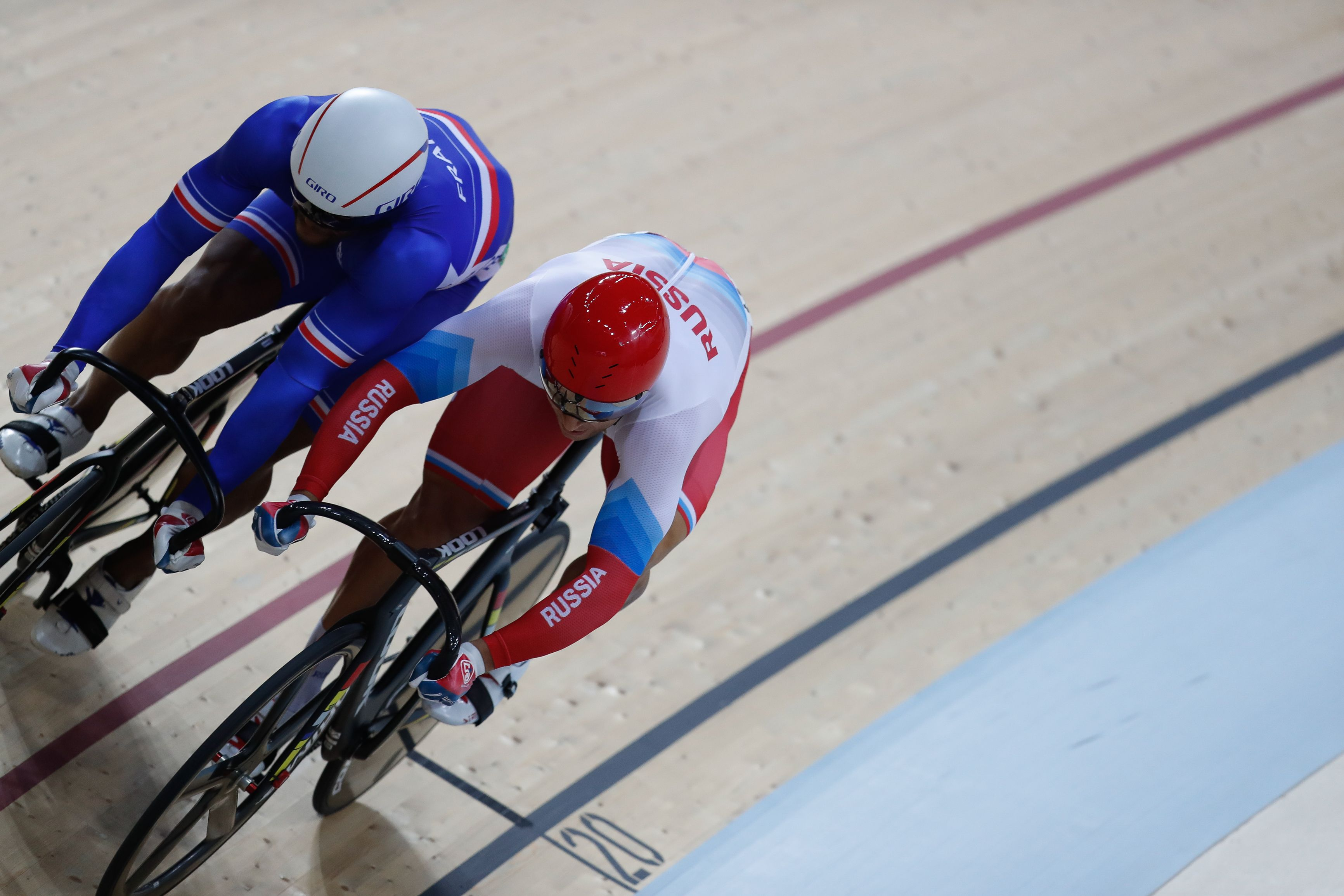 Fase final das competições de ciclismo no velódromo. O russo Denis Dmitriev e o francês Gregory Bauge nas quartas-de-final sprint de ciclismo no Velódromo dos Jogos Rio 2016, no Parque Olímpico.